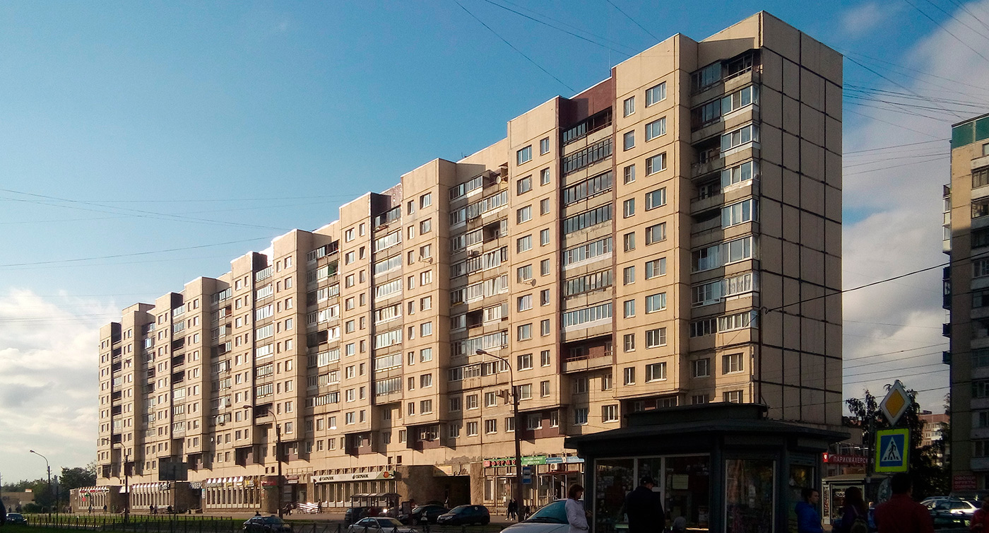 Жилой дом в Колпино по ул. Ижорского Батальона